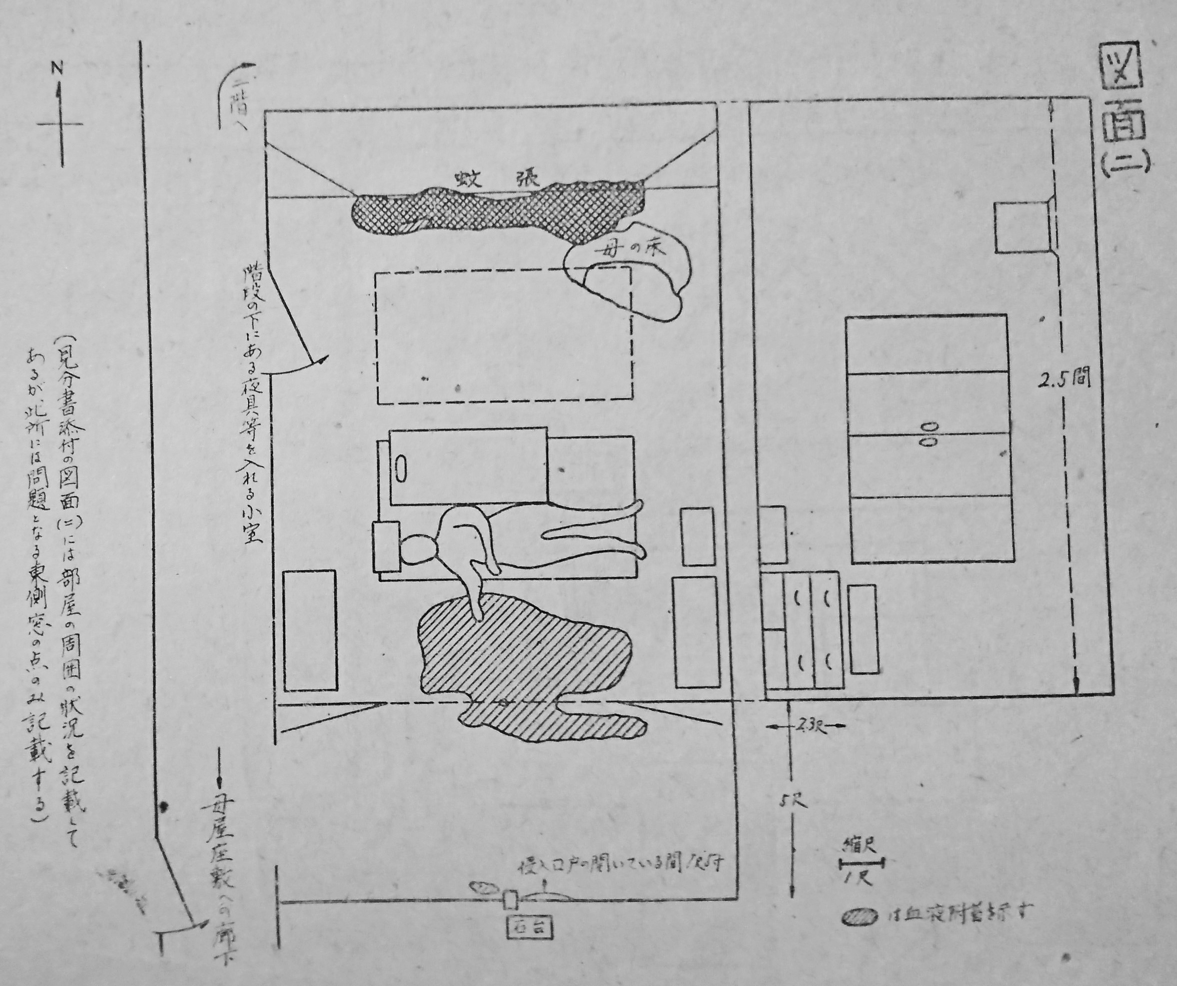 弘前大学教授夫人殺人事件の遺体の状況（1949年8月7日付実況見分調書より。ただしそれより数数週間後に作成されたとの指摘あり）